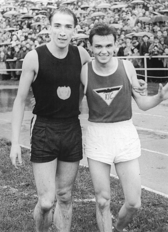 Zentralbild Wendorf-Dressel Wend-Ho. 29.9.1957 Rudolf-Harbig-Gedenksportfest in Dresden Am Sonntag, dem 29.9.1957, fand in Dresden das Rudolf-Harbig-Gedenksportfest statt. Zum ersten Mal wurde diese Veranstaltung im Heinz-Steyer-Stadion durchgeführt. Bei den zum fünften Mal ausgetragenen Wettkämpfen waren auch zahlreiche ausländische Spitzenkräfte am Start. UBz: Manfred Steinbach (links), der den 100-m-Lauf gewinnen konnte, und der Westdeutsche Knörzer, der den 2. Platz belegte.